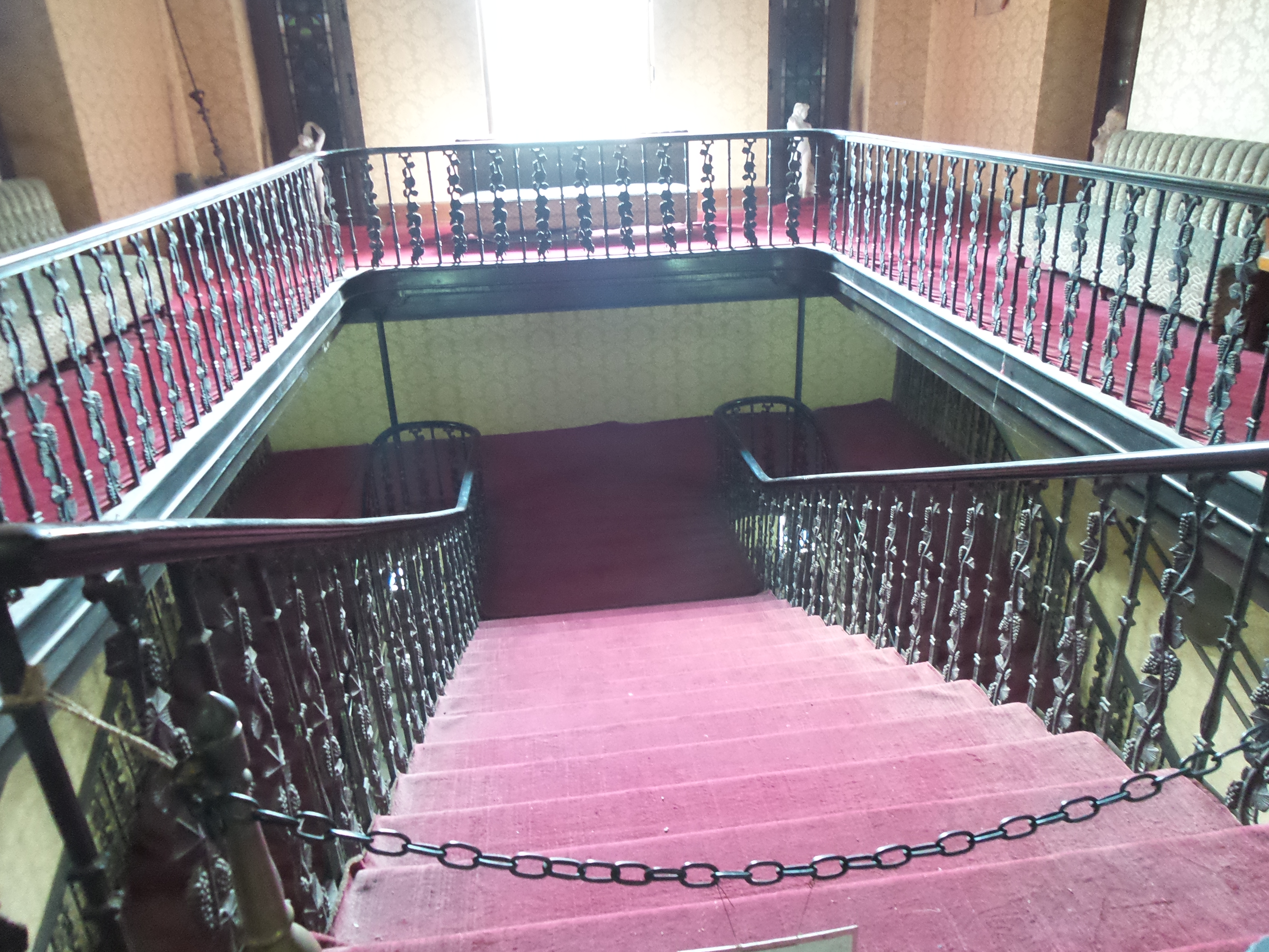 আহসান মঞ্জিল